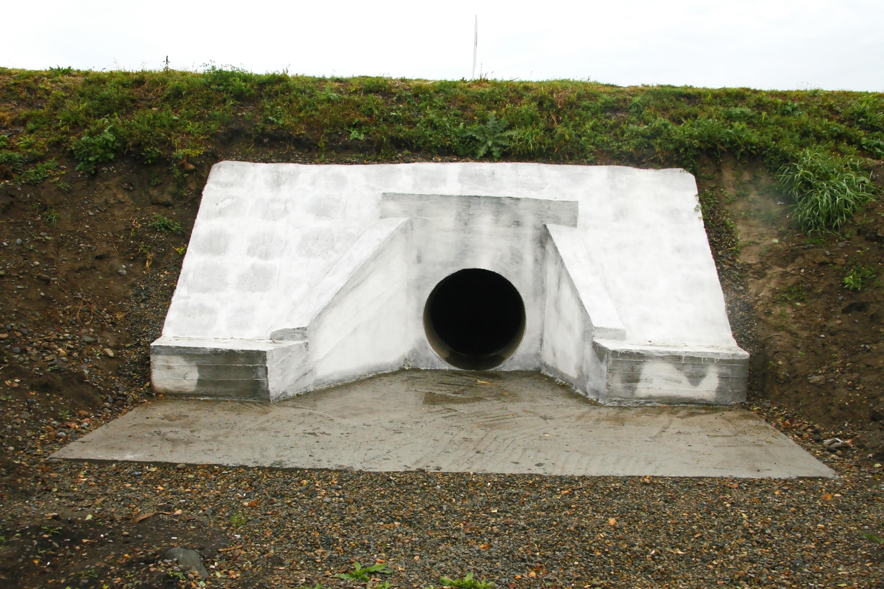 Круглая железобетонная труба после ремонта